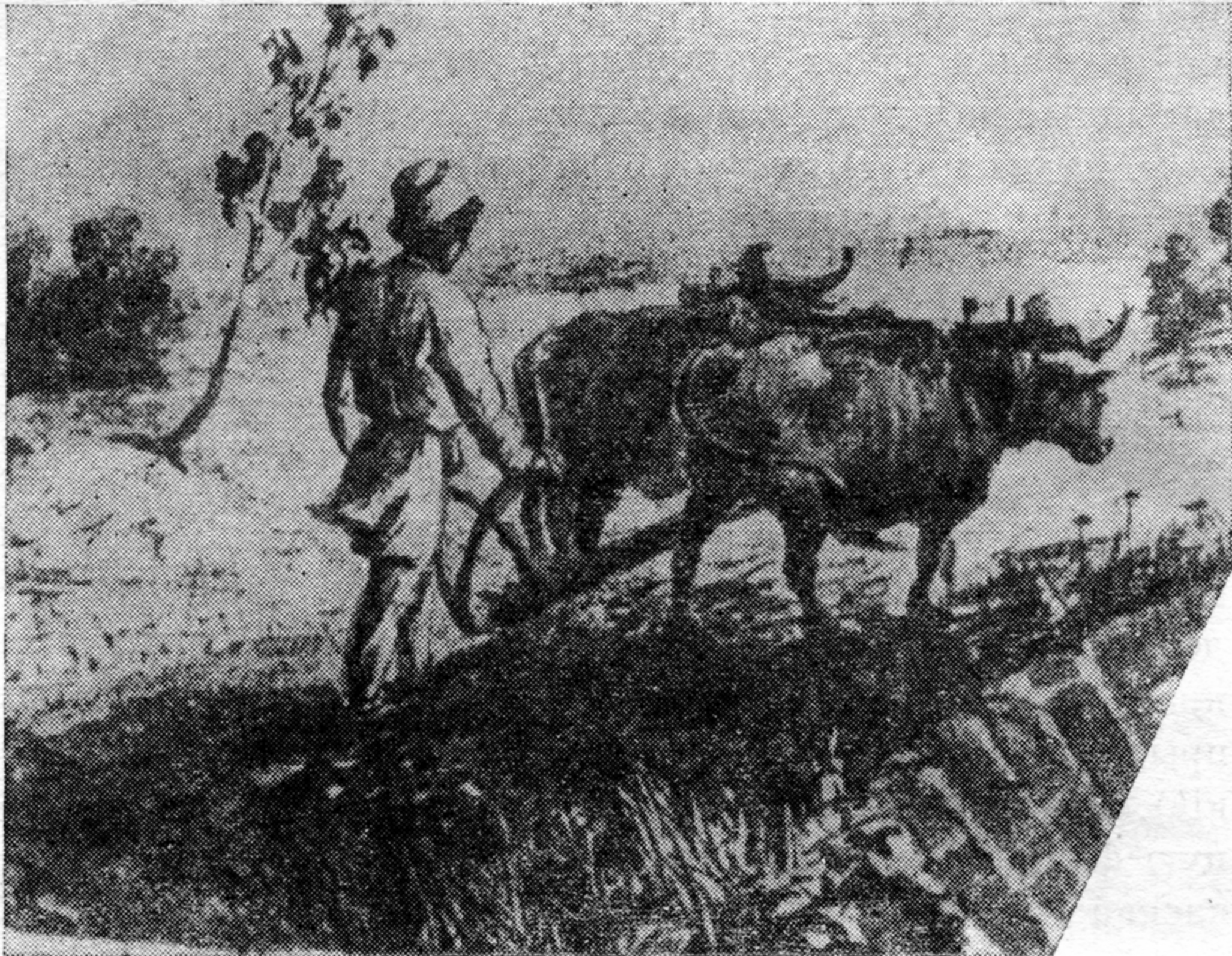 Беларуская (тарашкевіца): Малюнак беларускага паэта і празаіка Каруся Каганца (Казімера Кастравіцкага) «За сахой» (туш)